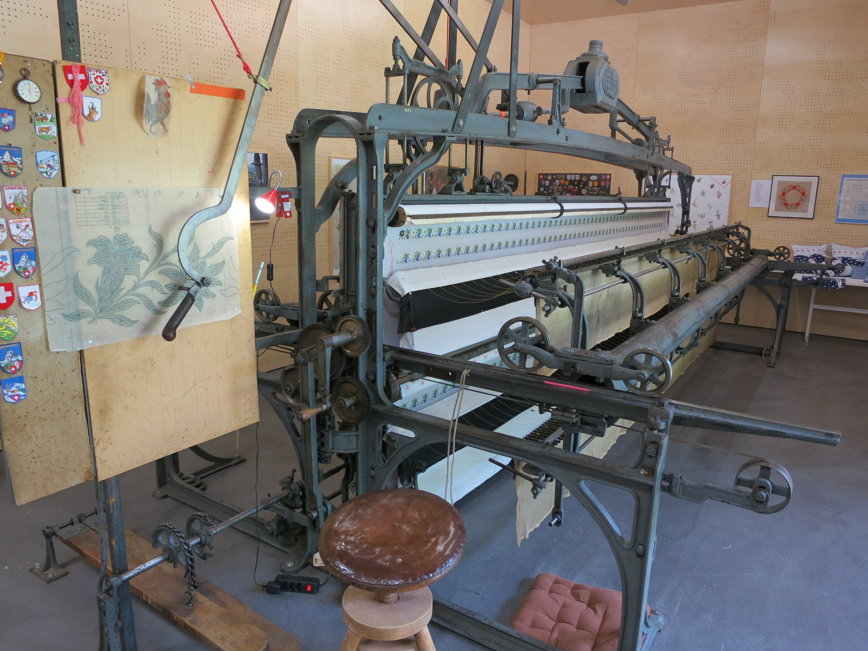 Handstickmaschine 1890er Jahre, Museum Industriekultur Neuthal, Bäretswil ZH, Schweiz